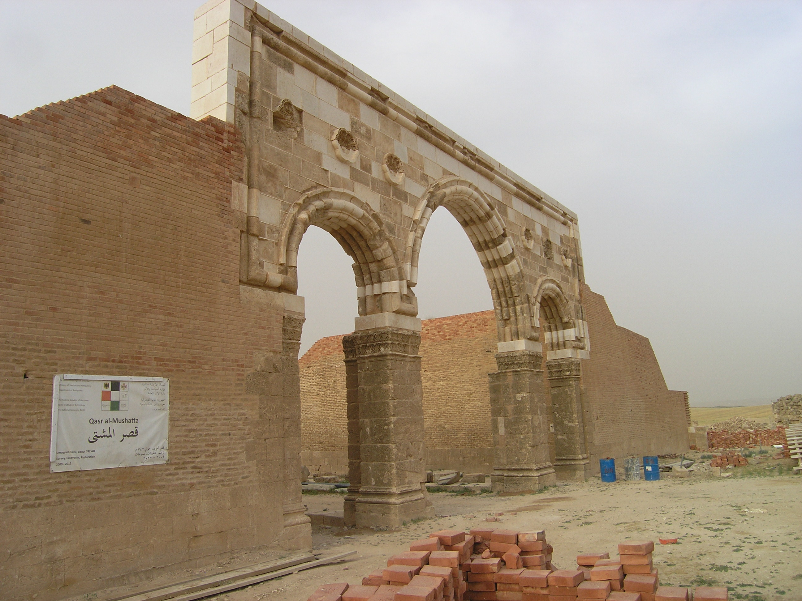 Mshatta - umayyadisches Wüstenschloss in Jordanien. Front mit aufgerichtetem Tor.